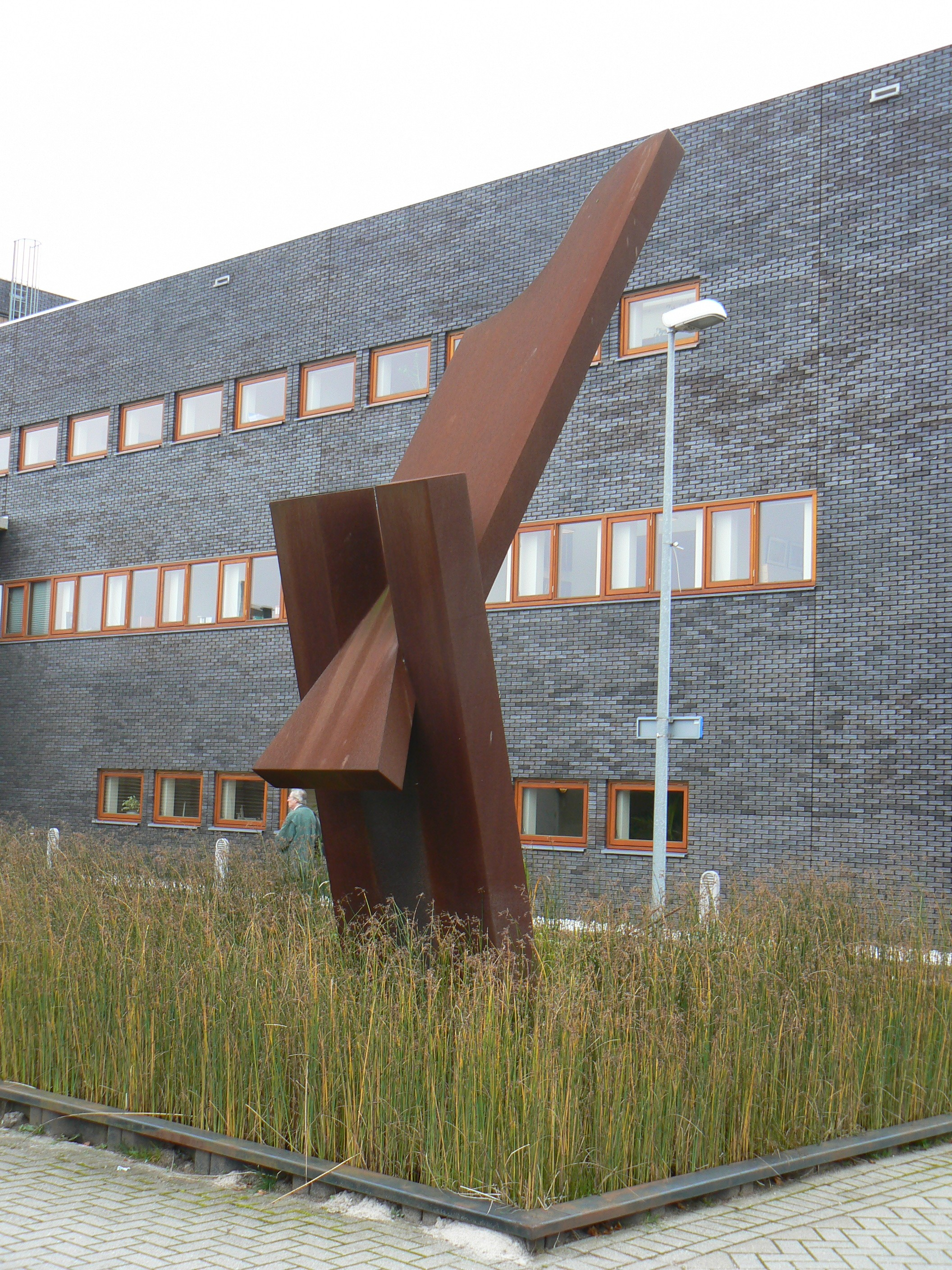 sculpture Zwaluwstaart by René de Boer in Groningen/The Netherlands